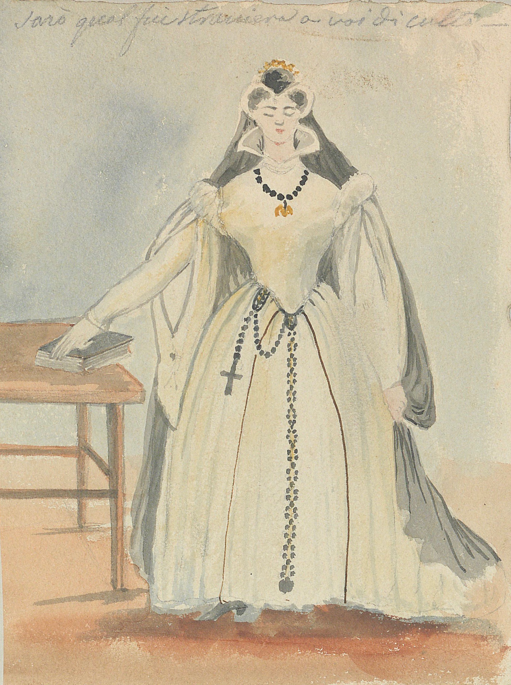 Projet de costume par Maria Malibran pour "Marie Stuart" extrait de "La Réforme du théâtre" (Bibliothèque royale du Conservatoire, B-BC, FC-002-MM-073)